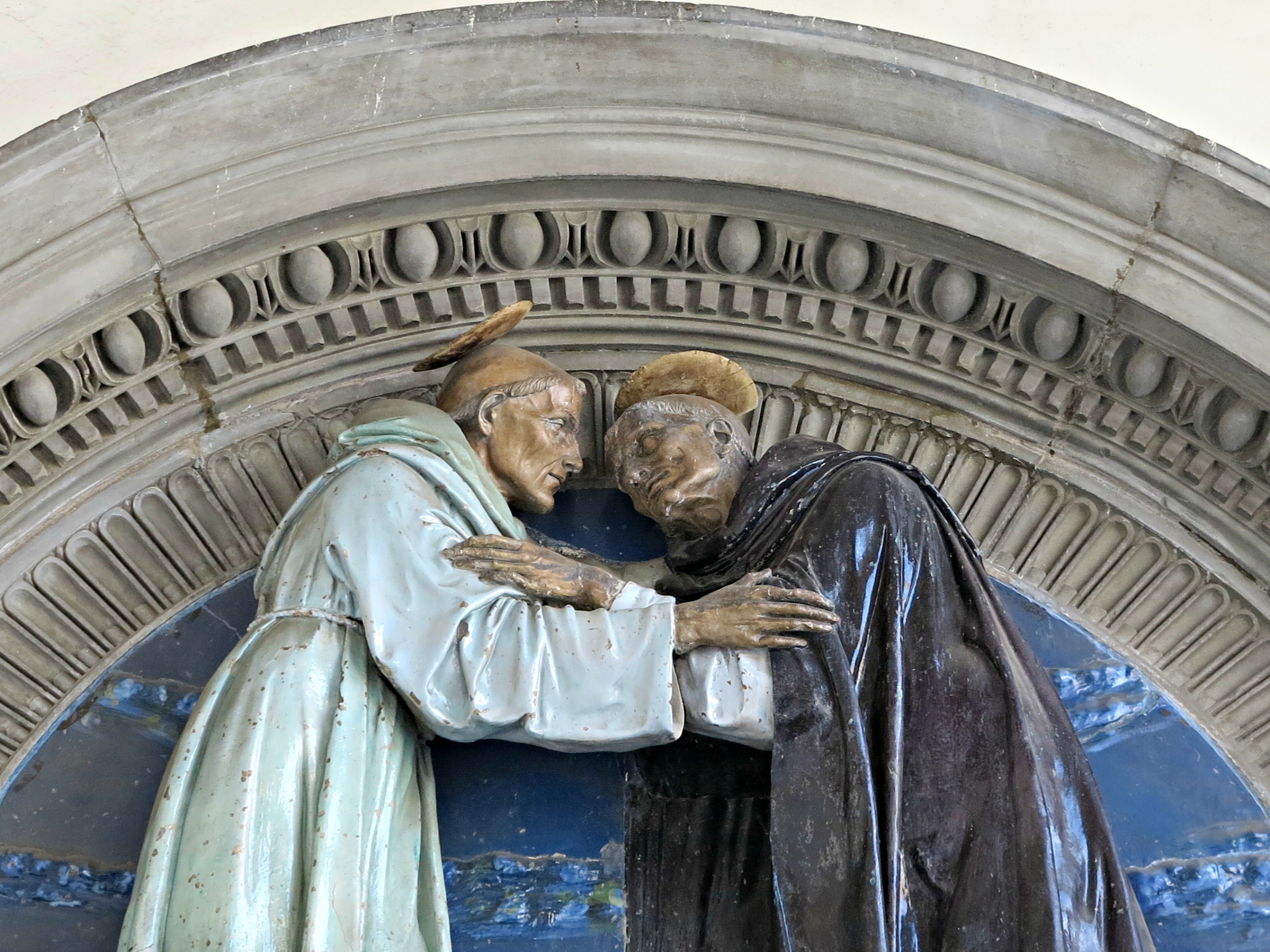 Lunetta in terracotta invetriata con l'incontro fra San Francesco e San Domenico di Andrea della Robbia, 1489 (1)